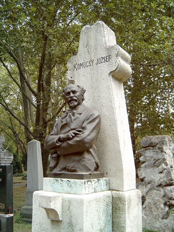 Komócsy József (Vencsellő, 1836. március 25. – Budapest, 1894. június 19.): költő, újságíró sírja (Komócsy Lajos bátyja.) Kerepesi temető: 34/1-1-25 [építészek: Bálint Zoltán és Jámbor Lajos, szobrász: Zala György]